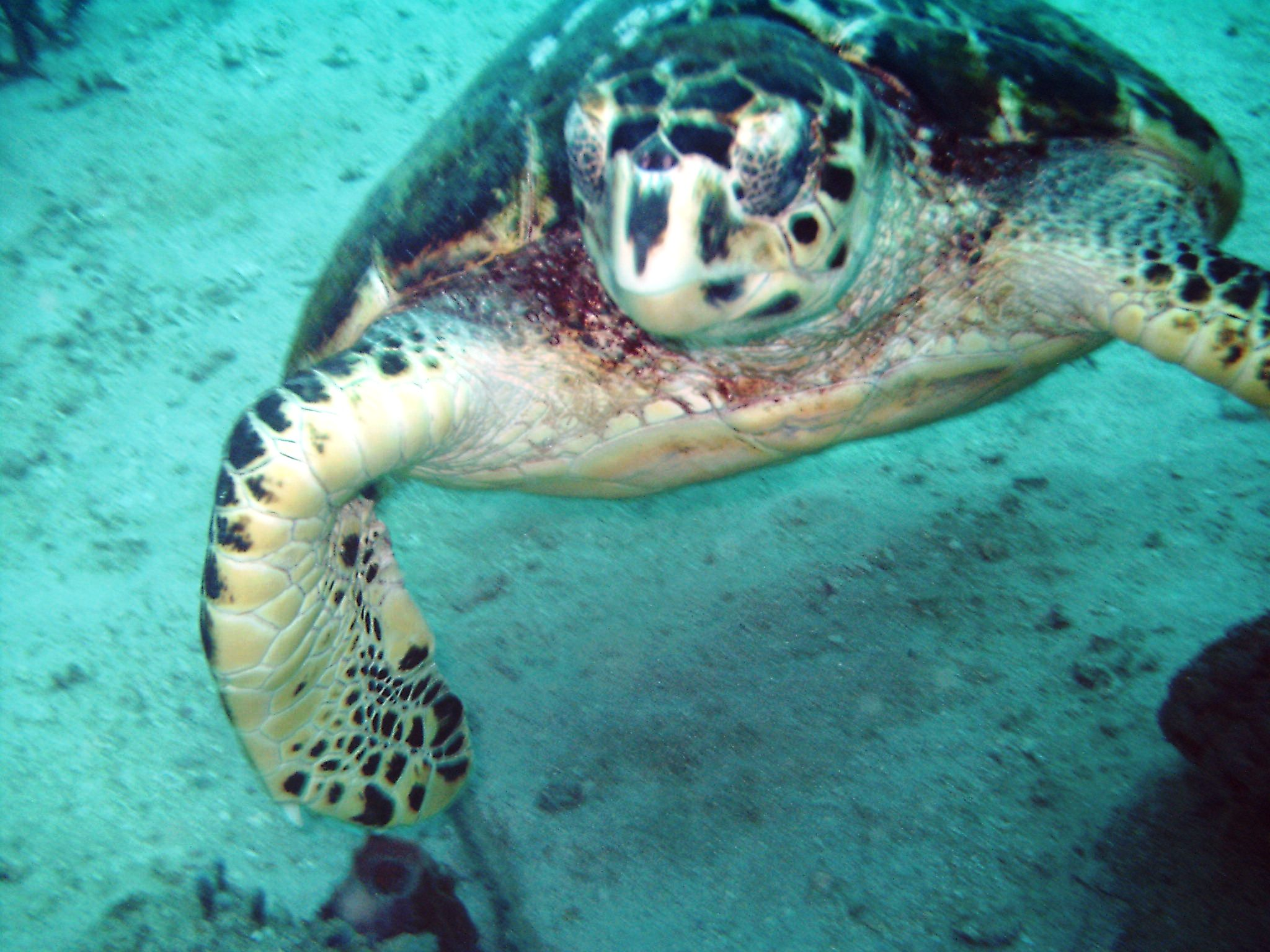 Autor: PSE Tortuga carey: Eretmochelys imbricata Localización: Venezuela, Estado Falcón, Tucacas, Parque Nacional Morrocoy, Area Especial, Cayo Norte, Zona de Buceo de El Jardín, profundidad 20 m. Junio 2006. Nótense las cuatro placas en la cabeza y entre los ojos, que la diferencian de la tortuga verde que sólo posee un par de placas alargadas, una al lado de la otra.